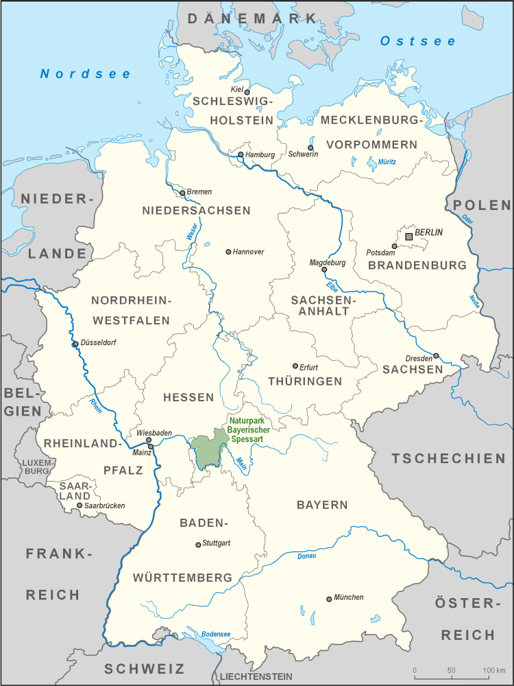 Karte des Naturparks Bayerischer Spessart in Deutschland